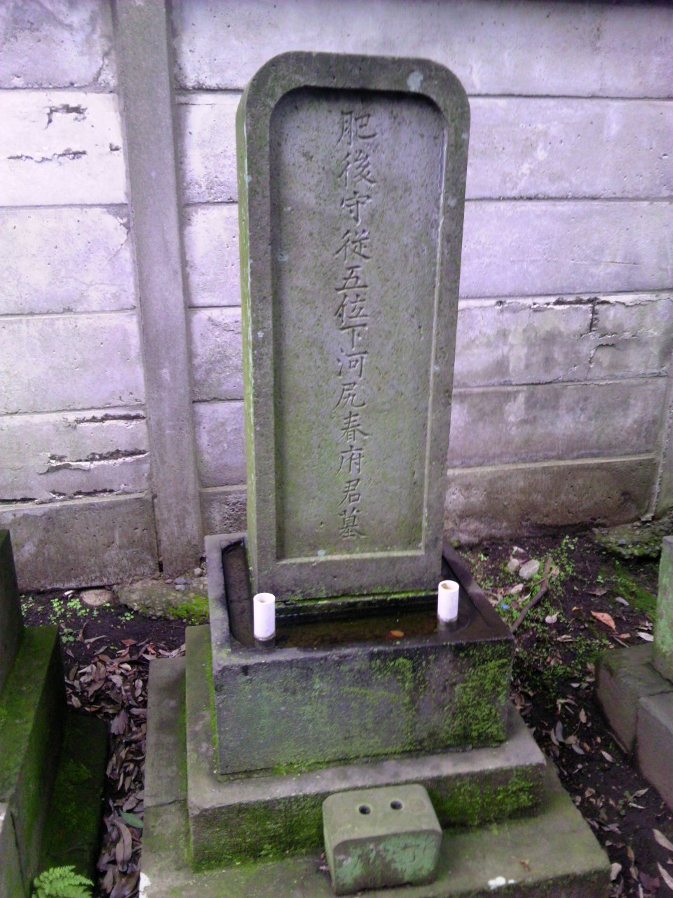 東京都中野区に現存する河尻の墓